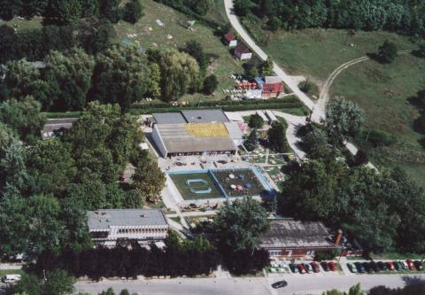 Igal, Hungary, aerialphotography